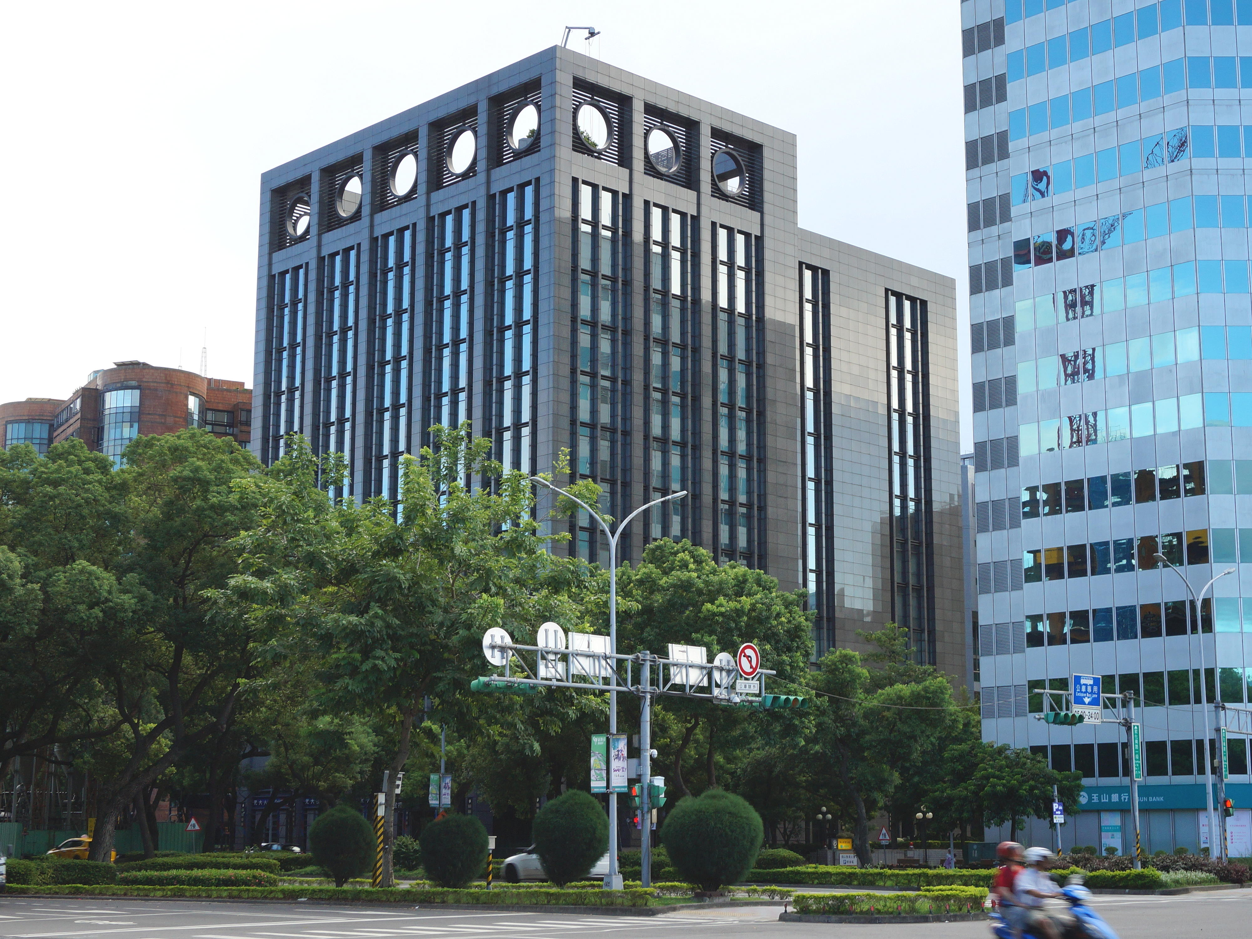 元大金控大樓，地址：臺北市松山區敦化南路一段66號。